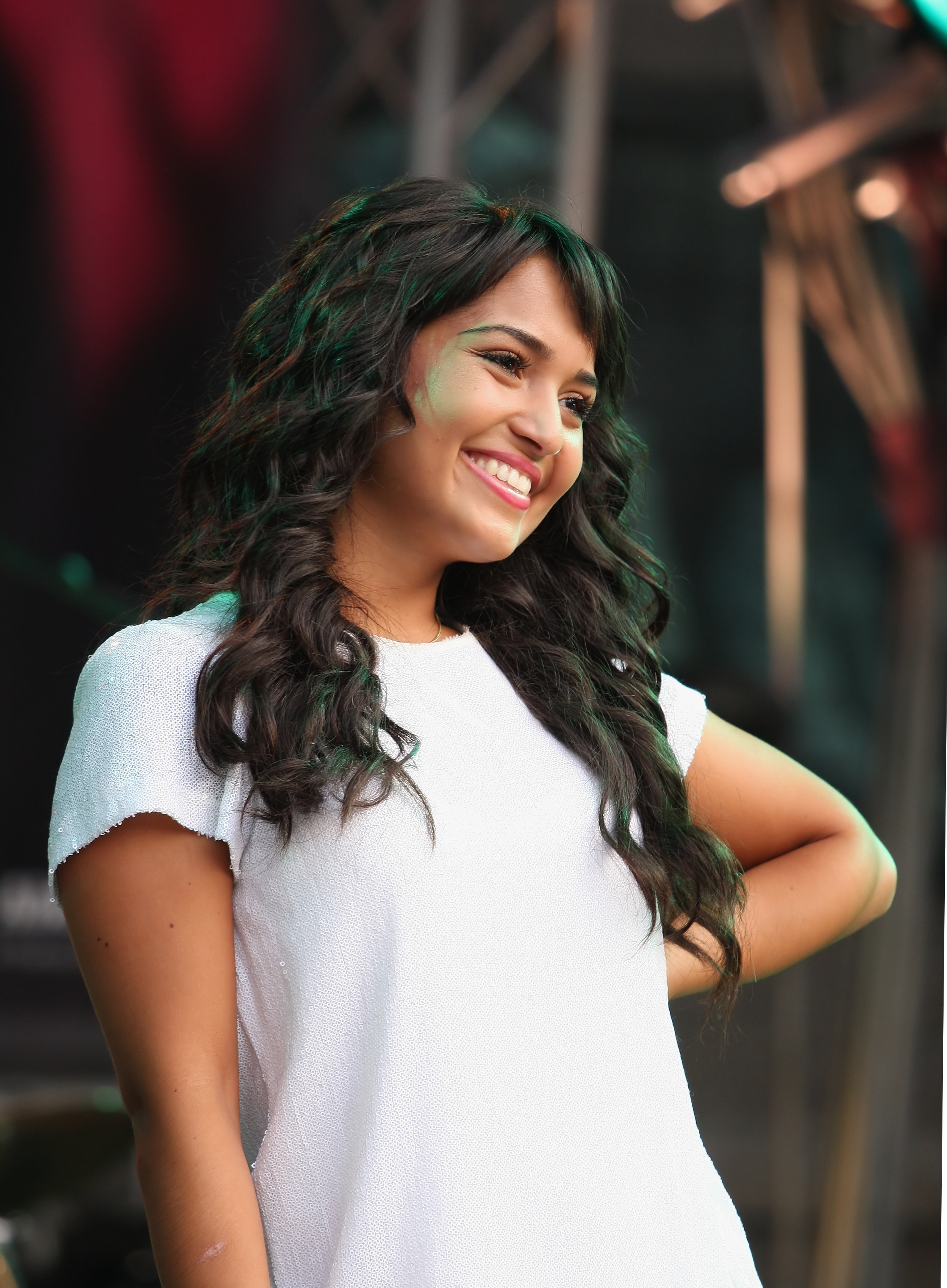 Die Gruppe „Monrose“ - Bahar Kızıl - auf der Hauptbühne auf dem Heumarkt, Köln. Bühnenprogramm zum CSD-Straßenfest/ColognePride 2009.